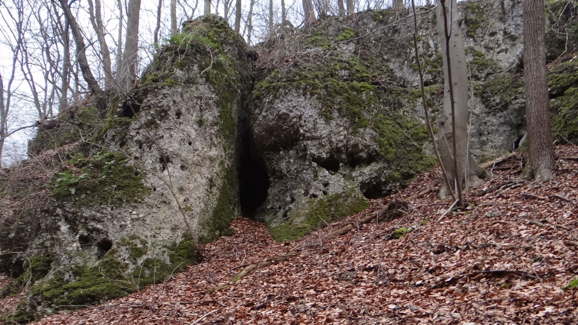 Szczelina w Środku Doliny (w Dolinie Kobylańskiej)